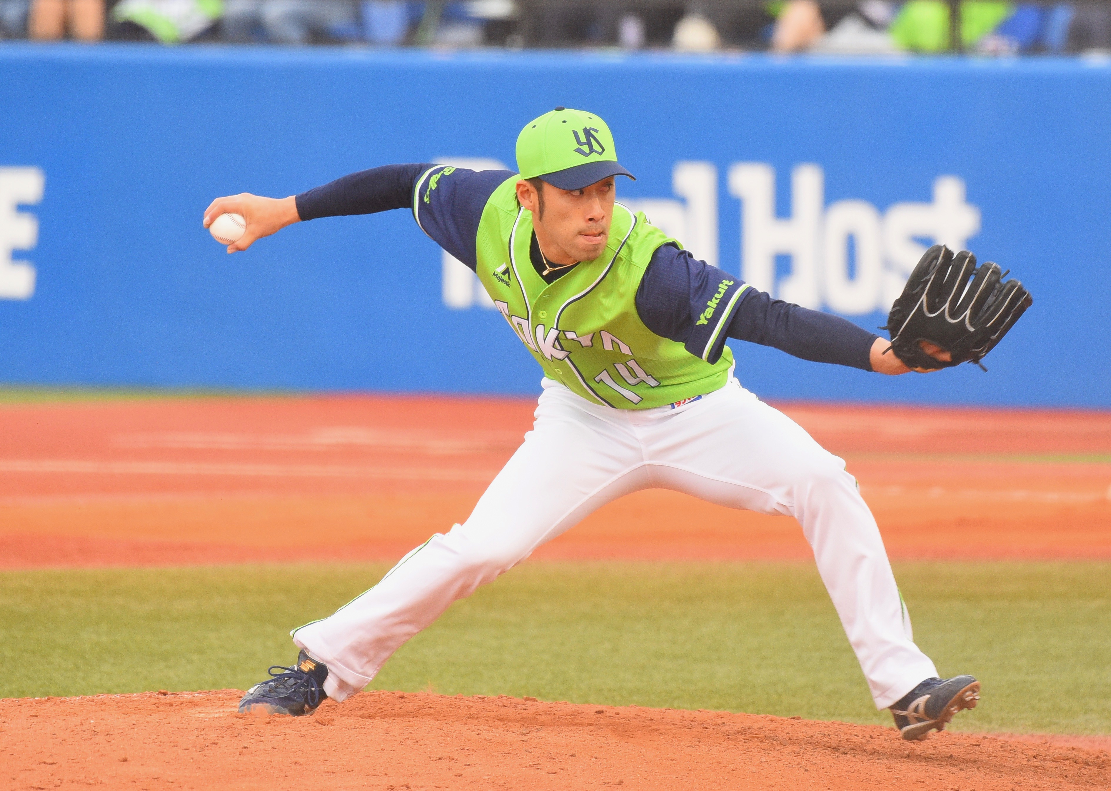 東京ヤクルトスワローズ 秋吉亮 2018年4月7日 神宮球場